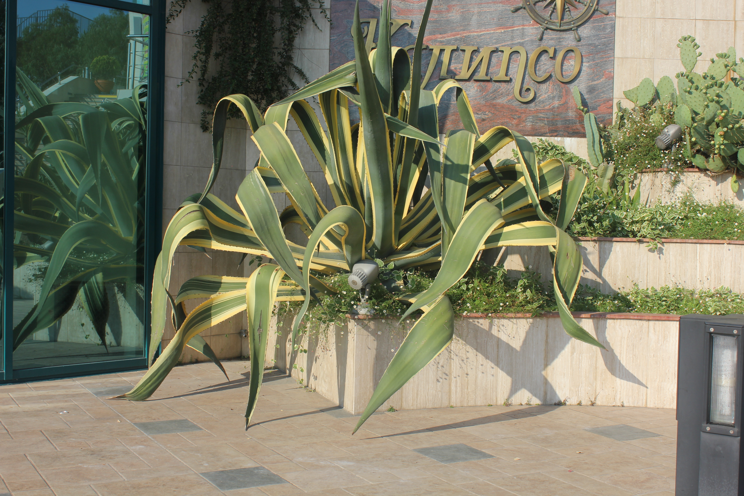 Агава в районе ресторана "Калиспо", морпорт, г Сочи